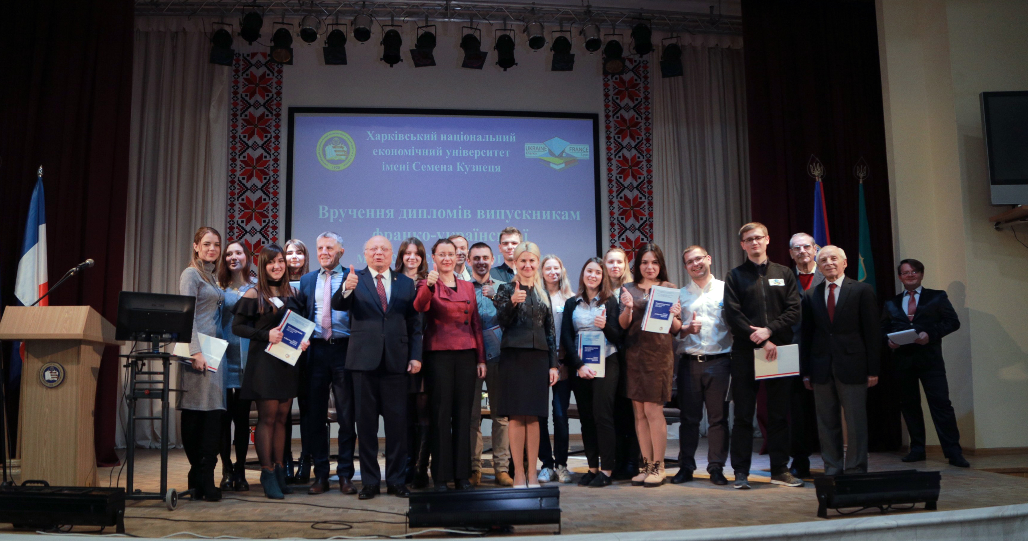 Вручення магістерських дипломів випускникам спільної франко-української магістерської програми Харківського національного економічного університету імені Семена Кузнеця та Університету Ліон-2 імені Люм’єр за участі Ректора ХНЕУ ім. С. Кузнеця Володимира Пономаренка, Голови Харківської обласної державної адміністрації Юлії Світличної та Надзвичайного і Повноважного Посла Франції в Україні пані Ізабель Дюмон. 26 жовтня 2017 року.